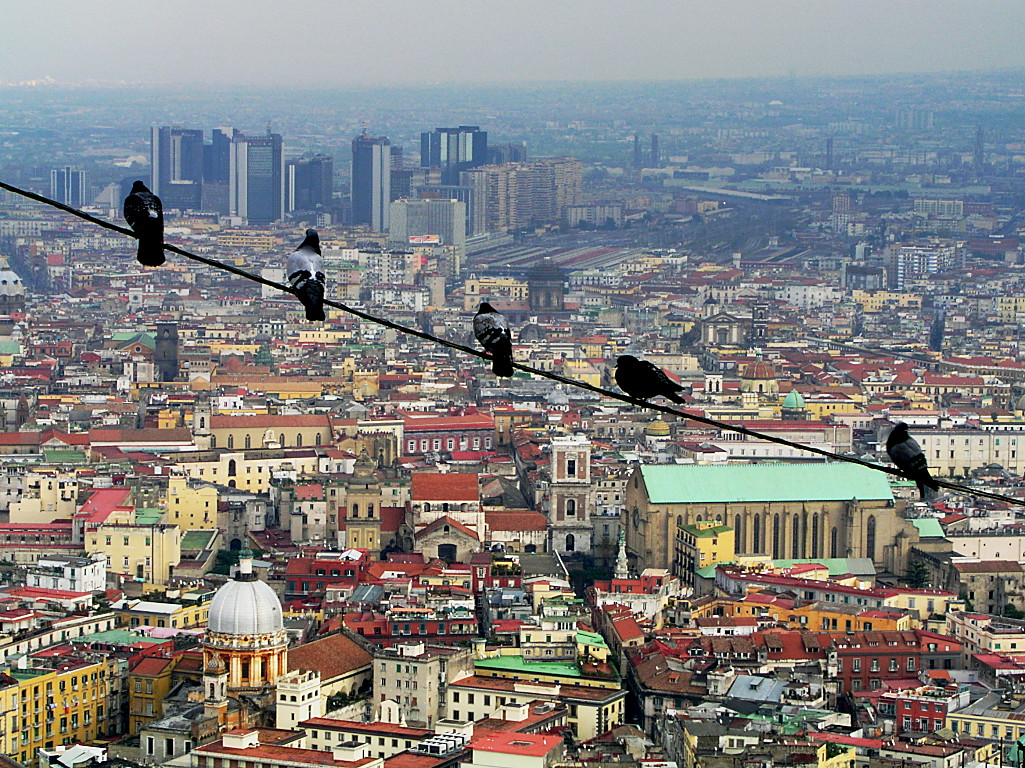 Neapel - Blick vom Castel Sant'Elmo